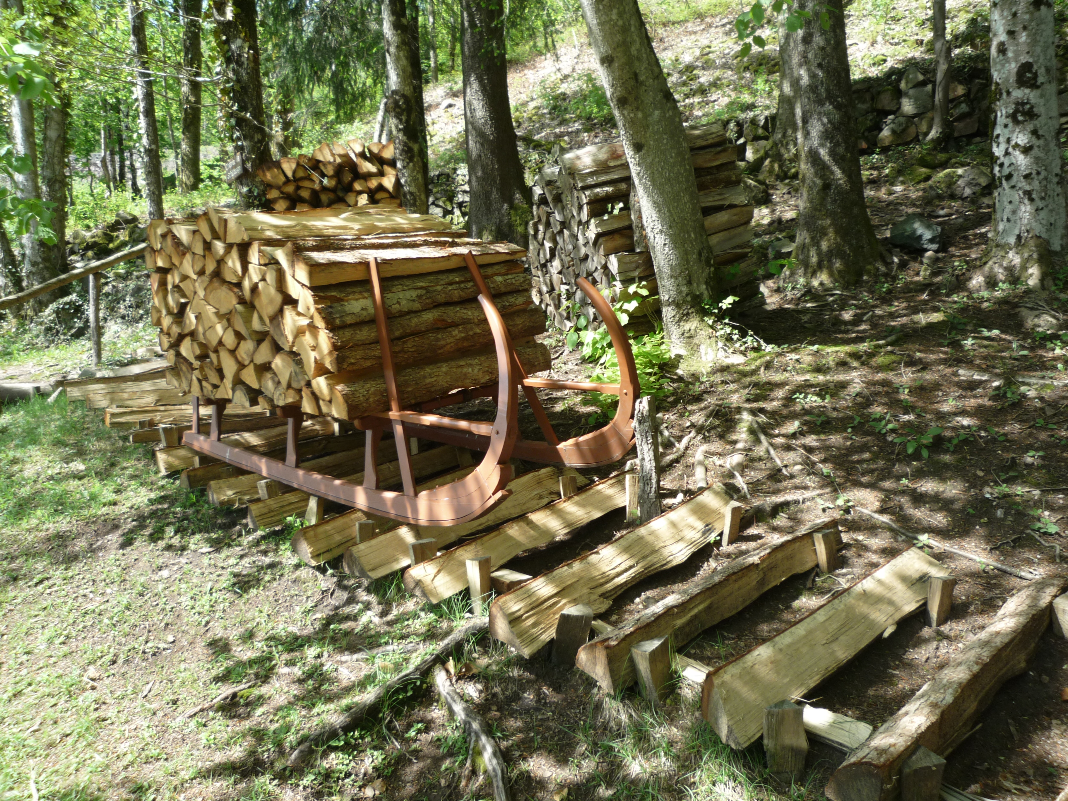 Traîneau ou "schlitte" qui était utilisée pour descendre dans les vallées le bois des montagnes. Le terme régional de "schlitte" est utilisé dans les Vosges.